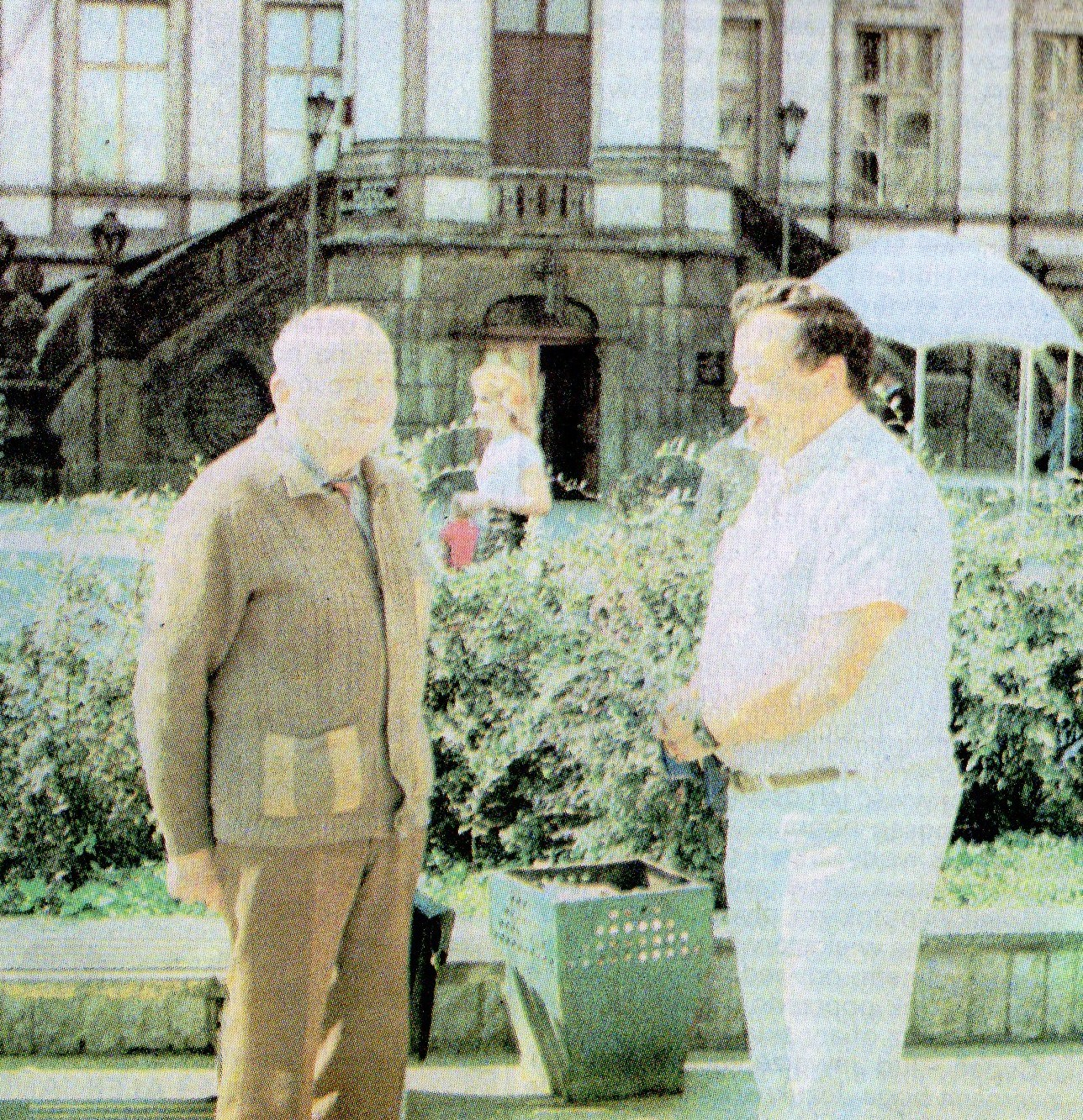 Tadeusz Gumiński - nestor legnickiej turystyki z lewej i Waldemar Michalski - wiceprezes ZW PTTK w Legnicy.